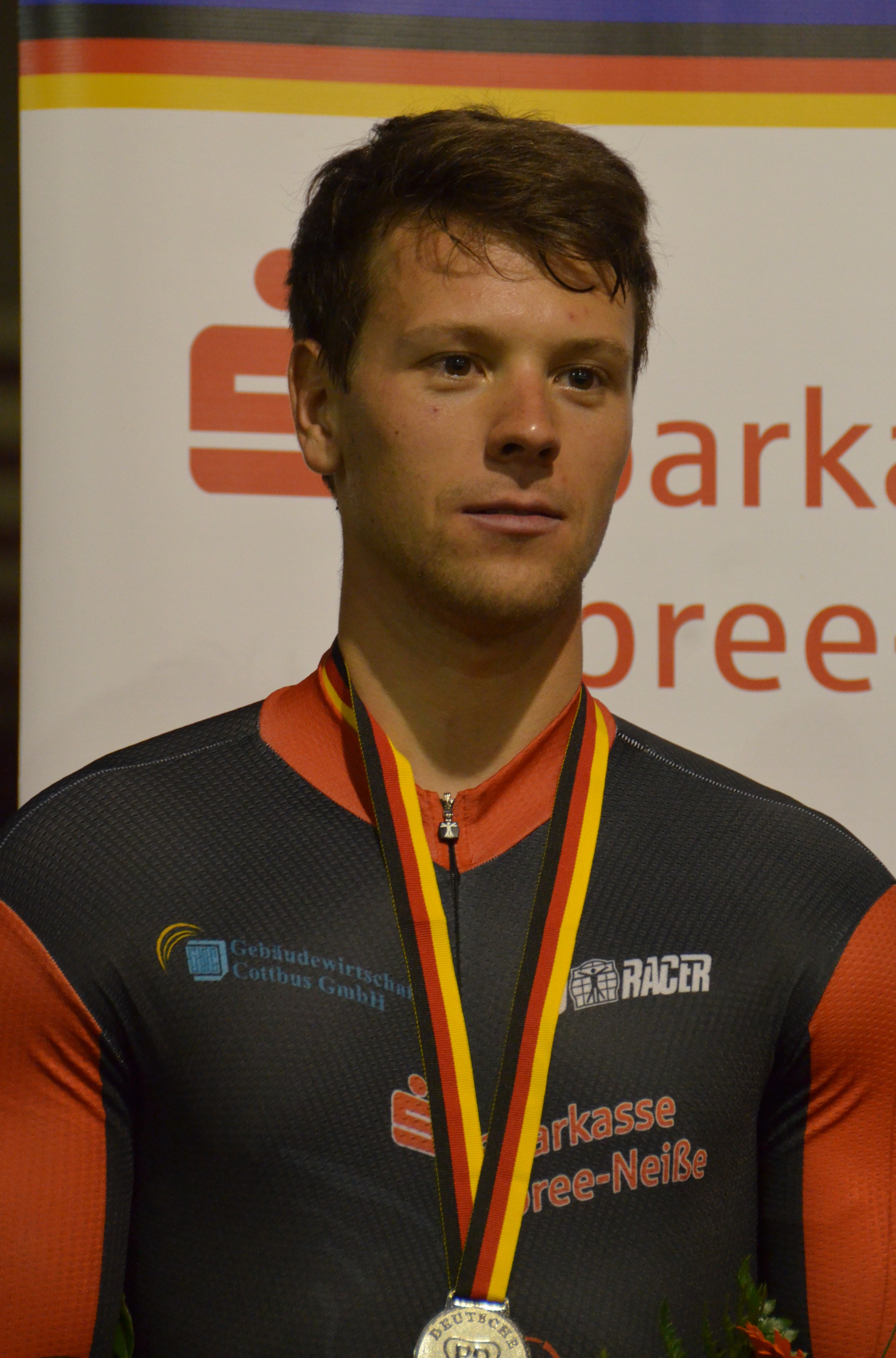 Eric Engler, deutscher Radsportler The making of this document was supported by the Community-Budget of Wikimedia Germany.